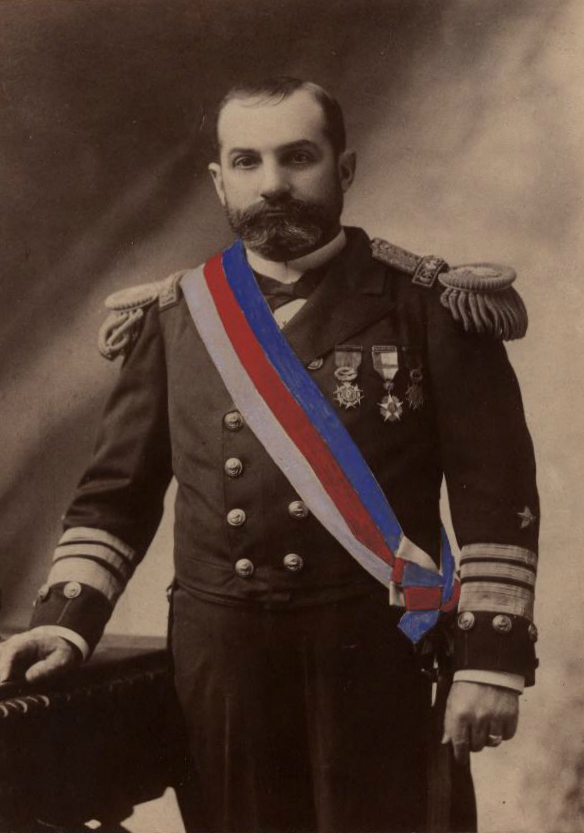 Jorge Montt Álvarez, Presidente de la República de Chile, años 1891 al 1896. Cuadro de G. Pérez Font, calle puente N°619-623, Santiago